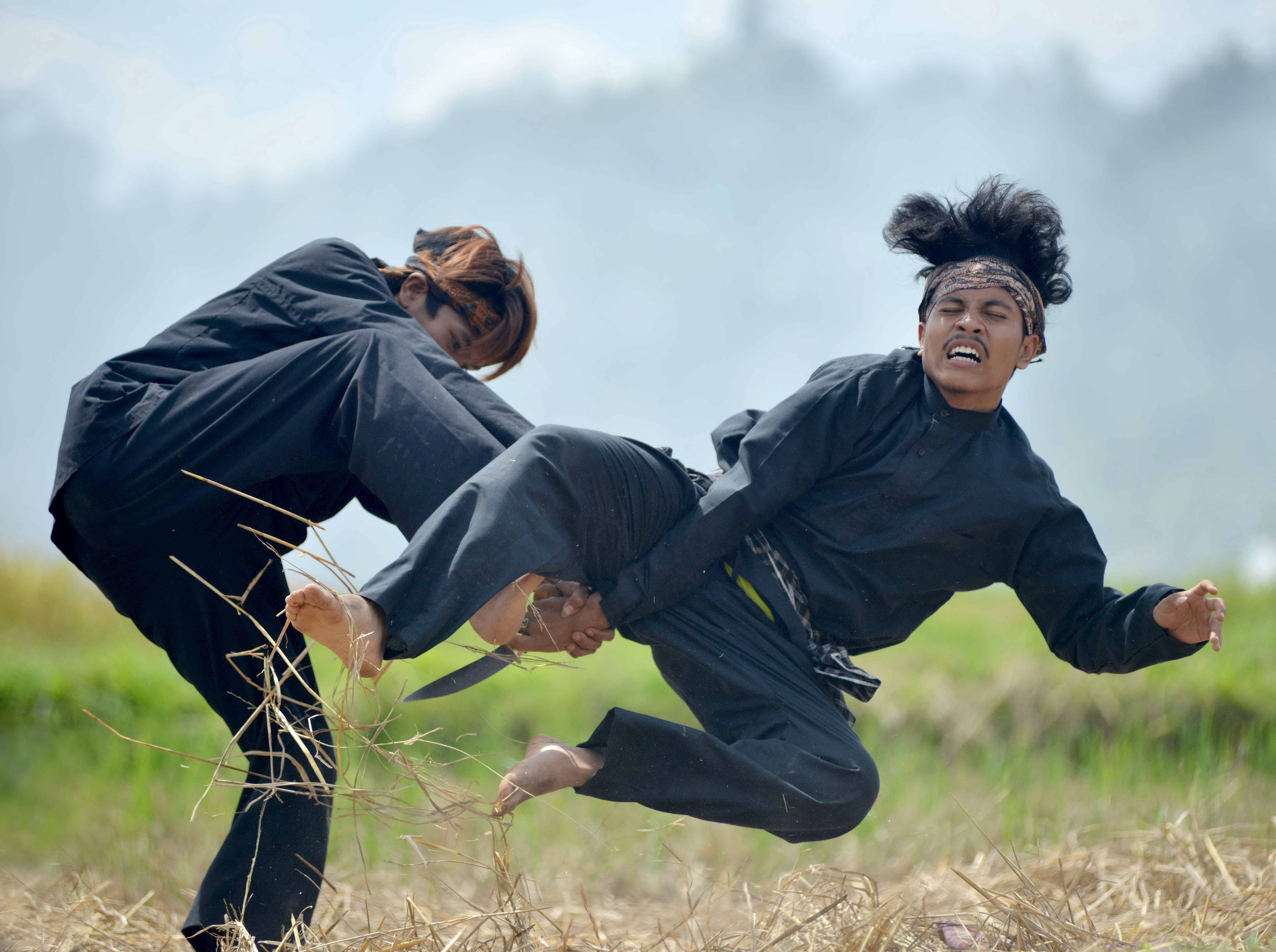 Silek Tuo, silek khas kebanggaan orang Minang, memiliki juru-jurus khas yang mematahkan dan mematikan langkah lawan.